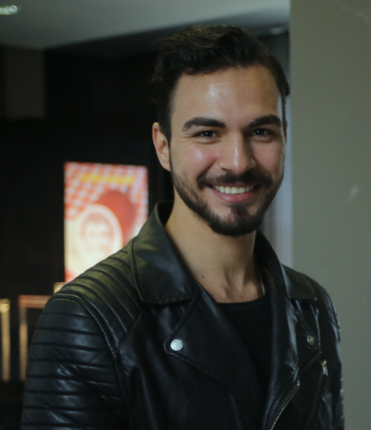 Abdullah Kenan Karaca ist ein deutscher Theaterregisseur. Hier am 10. September 2015 in München. Titel des Werks: "Abdullah Kenan Karaca, deutscher Theaterregisseur (2015)"